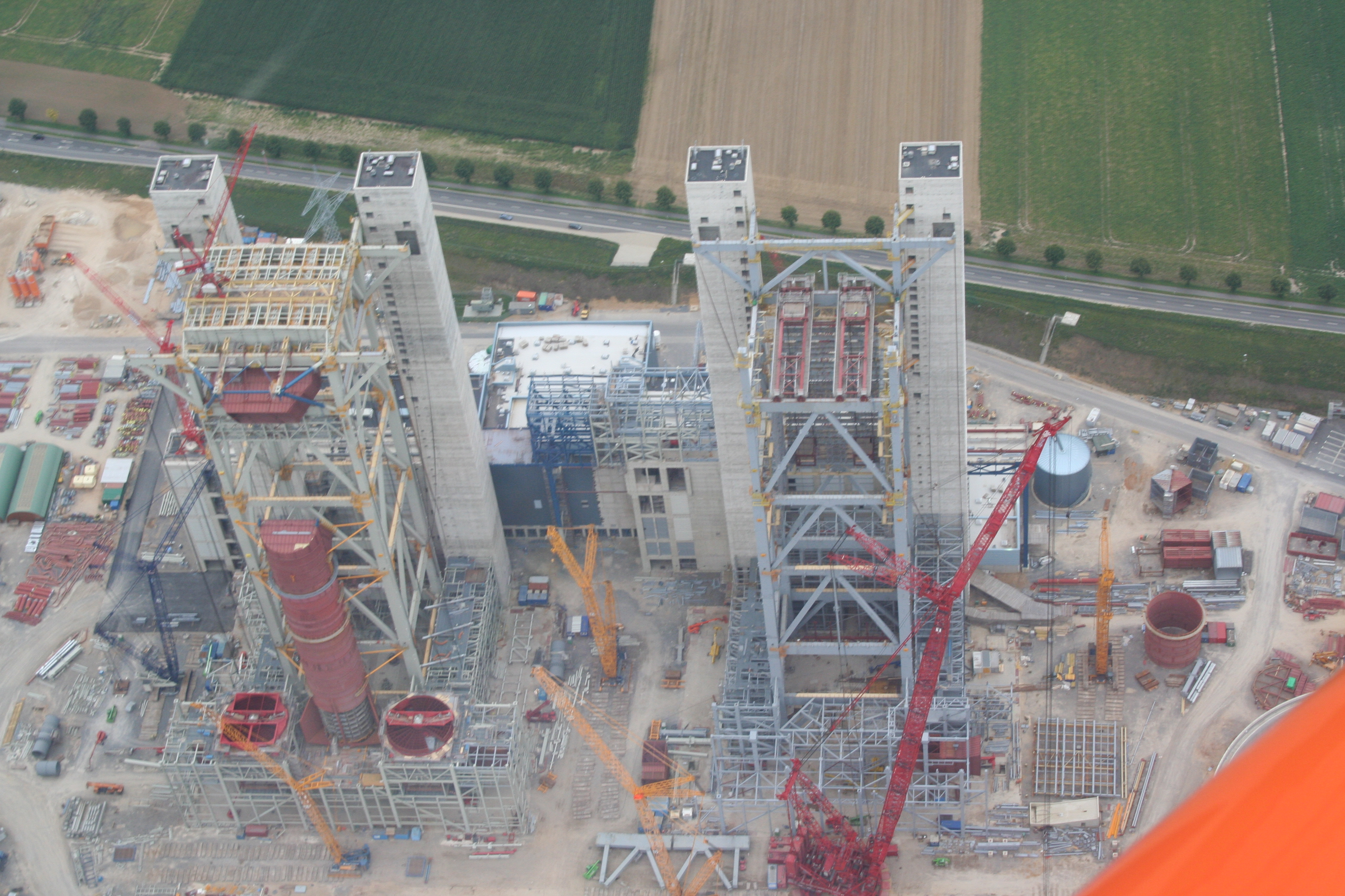 Mammoet PTC (=platform twinring, containerized) New generation (SFSL) (=main boom + fixed jib) auf der Baustelle des Braunkohlekaftwerks BOA in Neurath zusammen mit einigen kleineren Kranen